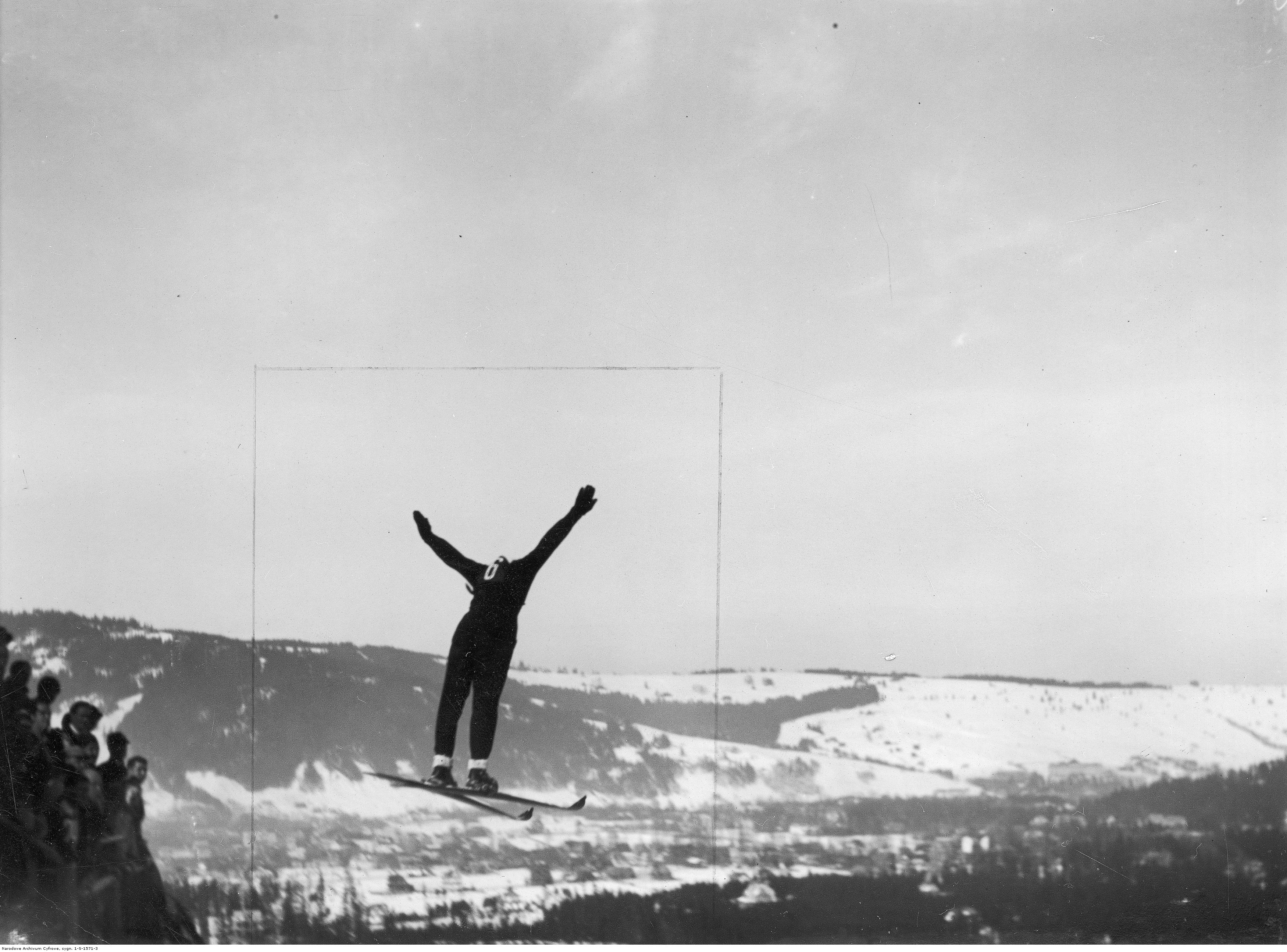 Konkurs skoków narciarskich na Wielkiej Krokwi w Zakopanem. Bronisław Czech w trakcie oddawania skoku. 1930-01-01 - 1930-02-22 (Koncern Ilustrowany Kurier Codzienny - Archiwum Ilustracji)